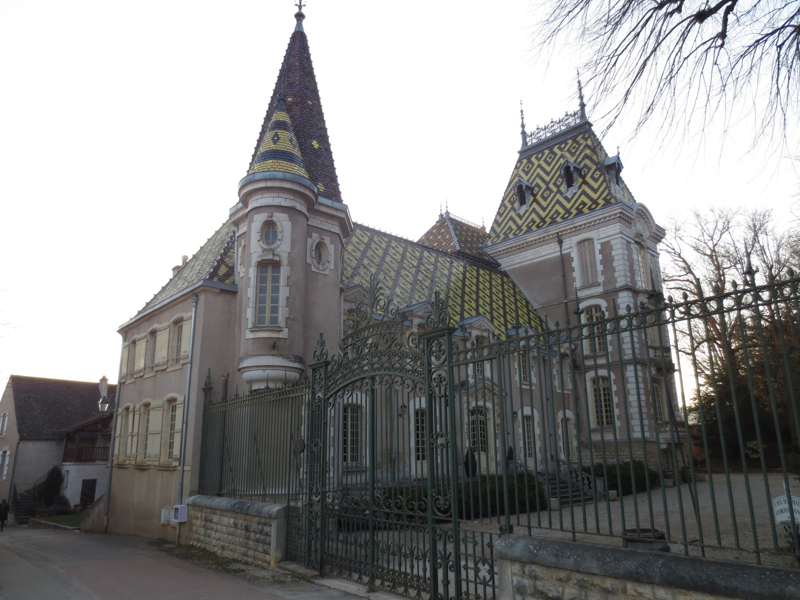 Château de Corton André